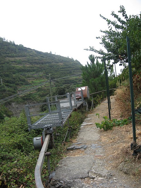 Egysínű vasút (trenino) a Cinque Terrén (Manarola, Olaszország)